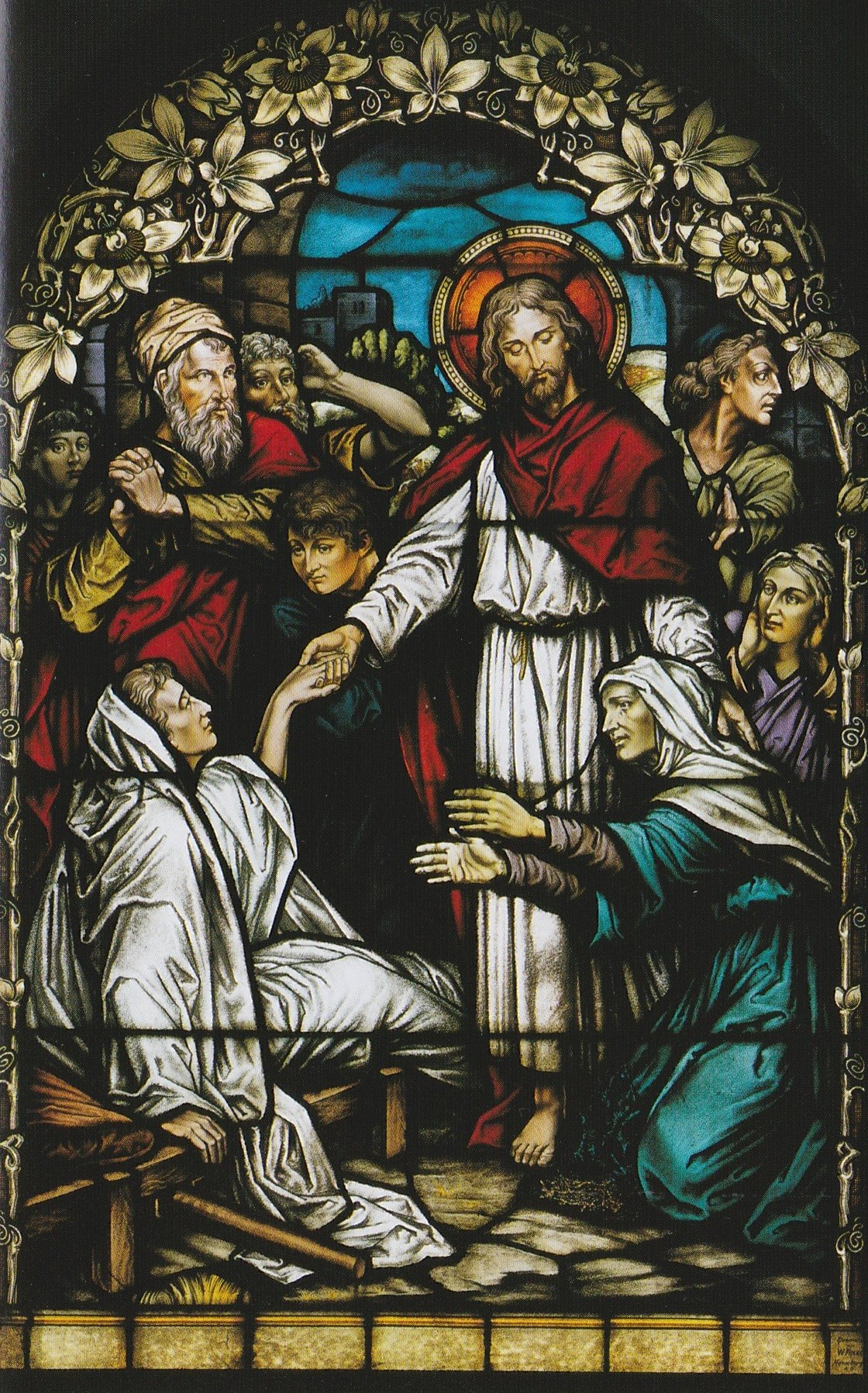 Glasfenster nach Vorlage v. H. Hofmann Archiv Domglas Naumburg